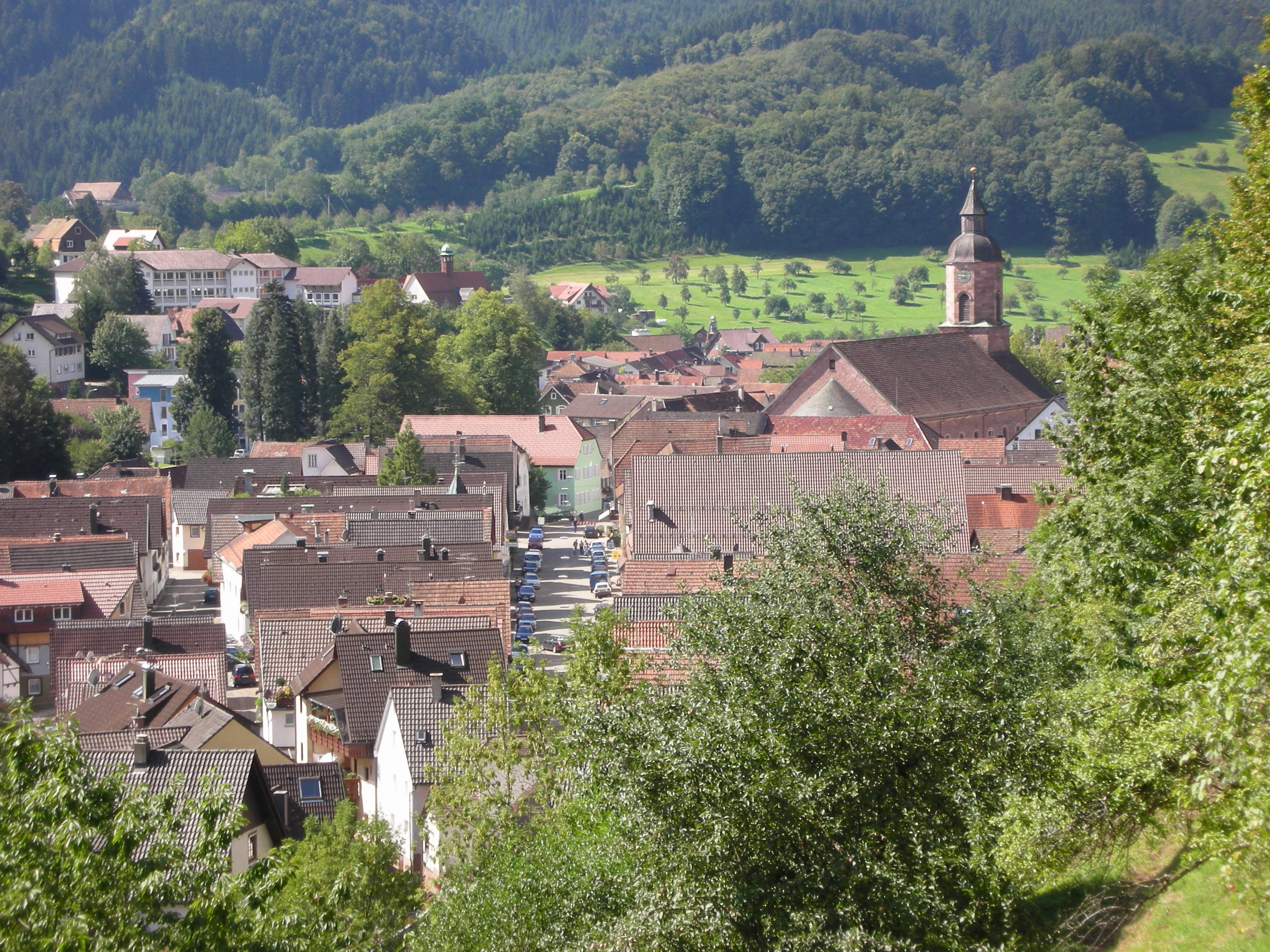 Stadt Oppenau. Blick auf Hauptstrasse und Kirche St. Johannes / city of Oppenau, view on Main St and city church